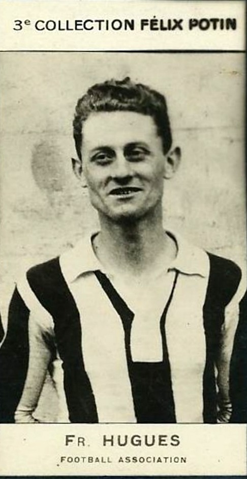 Hughes, Fr